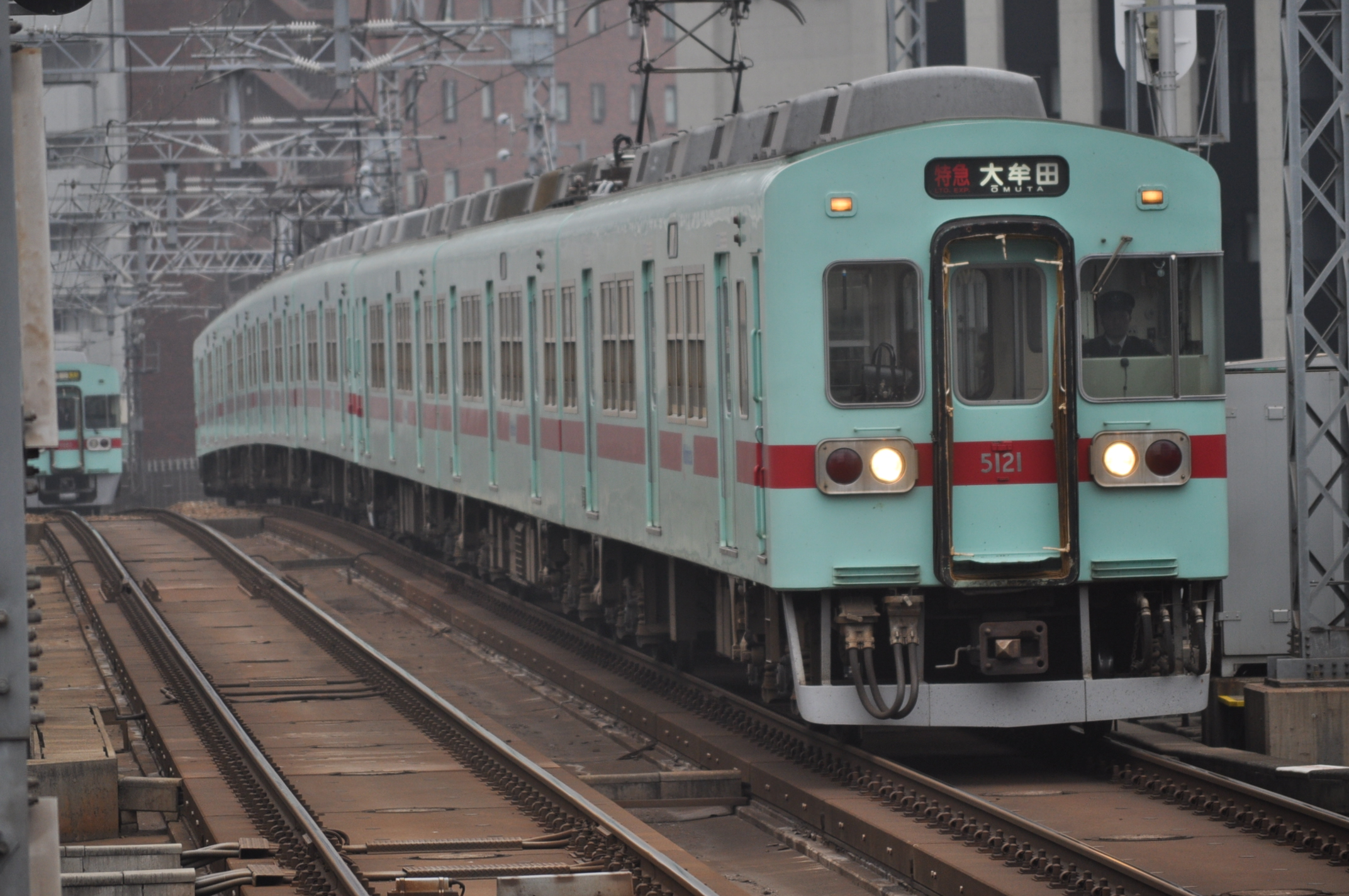 西鉄5000形。薬院駅で撮影